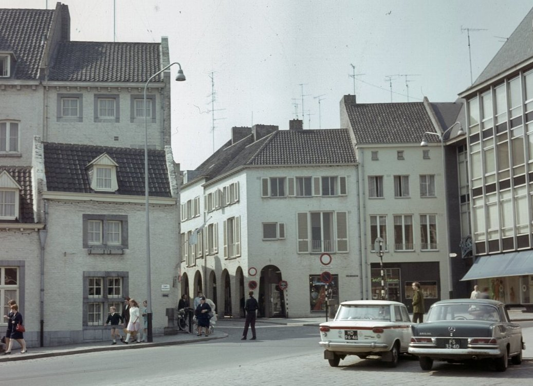 Overzicht van het hoekpunt met de smedenstraat This is a possible Rijksmonument: Find the monument in the Monuments database: Het Bat in Maastricht All Rijksmonumenten in Maastricht Is this a Rijksmonument? Yes No More information about this project and help. More images to work at in Category:Possible Rijksmonumenten.